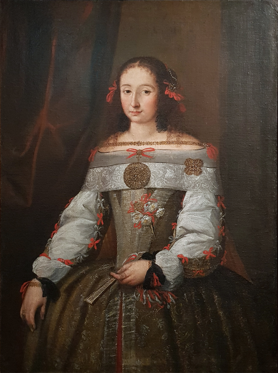 Беларуская (тарашкевіца): Партрэт Кацярыны Радзівіл (Kaciaryna Radzivił) з роду Патоцкіх (Patocki)